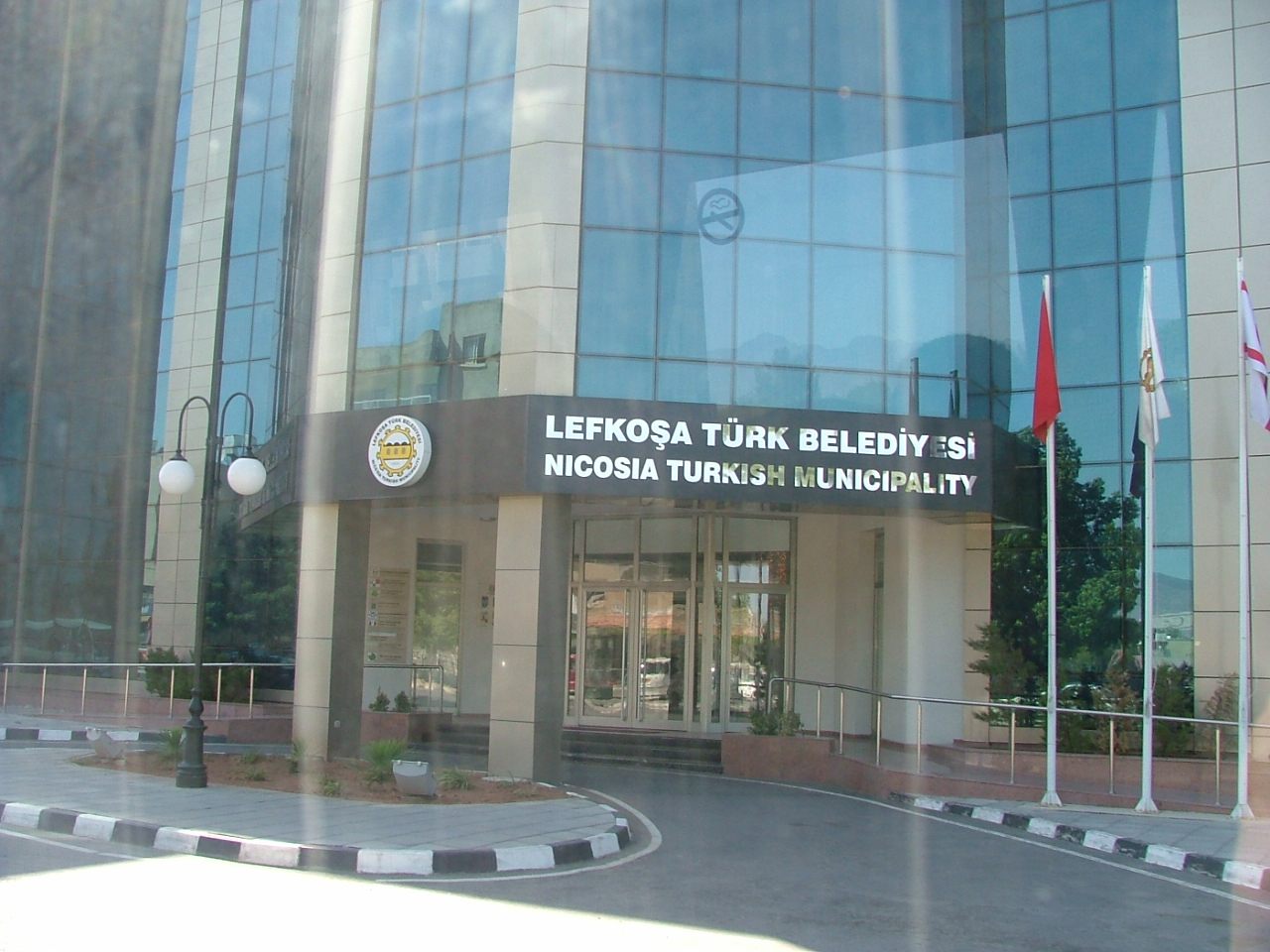 Lefkoşa Türk Belediyesi binası.